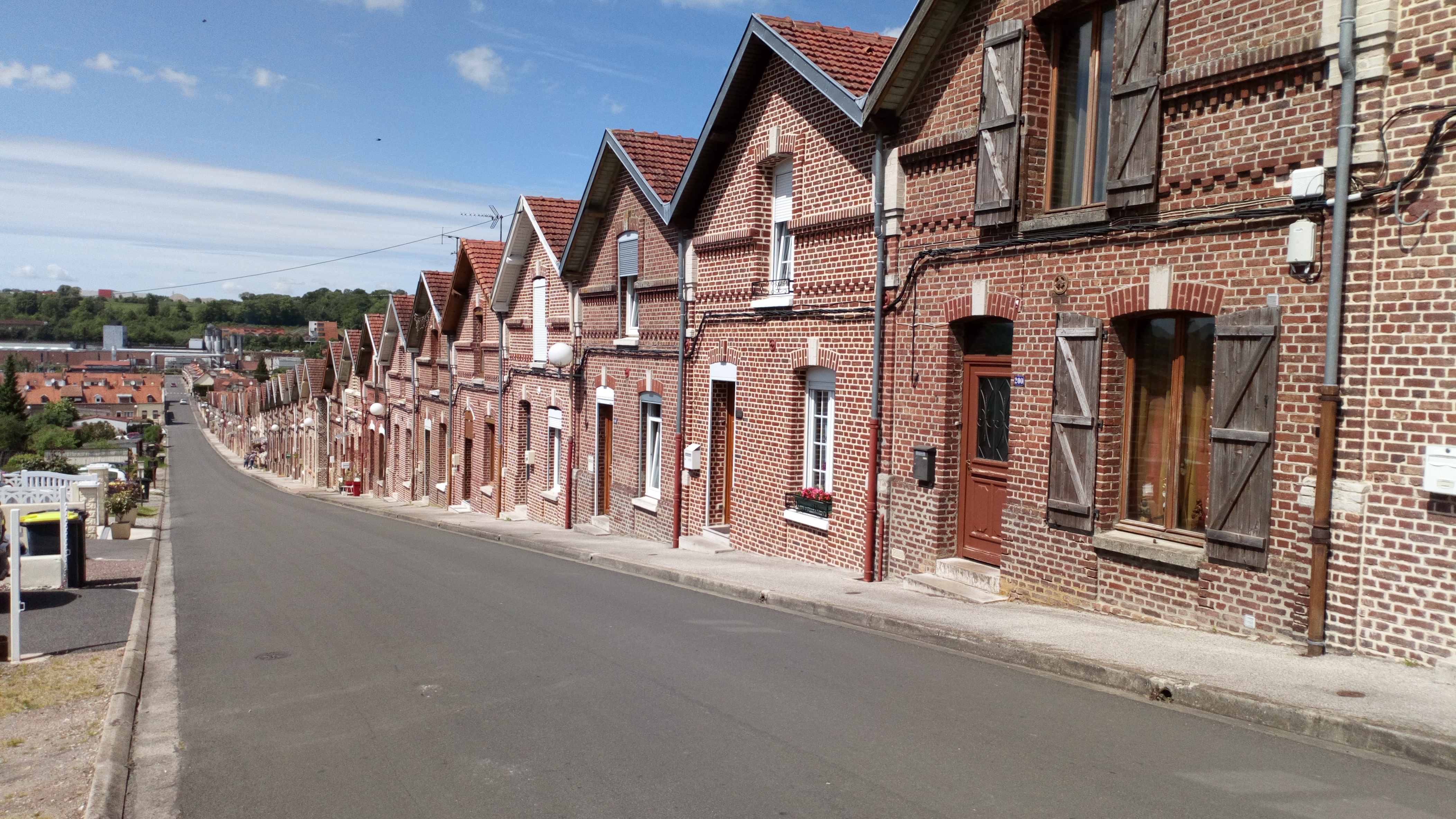 Rue Yves Poiret à Flixecourt 6